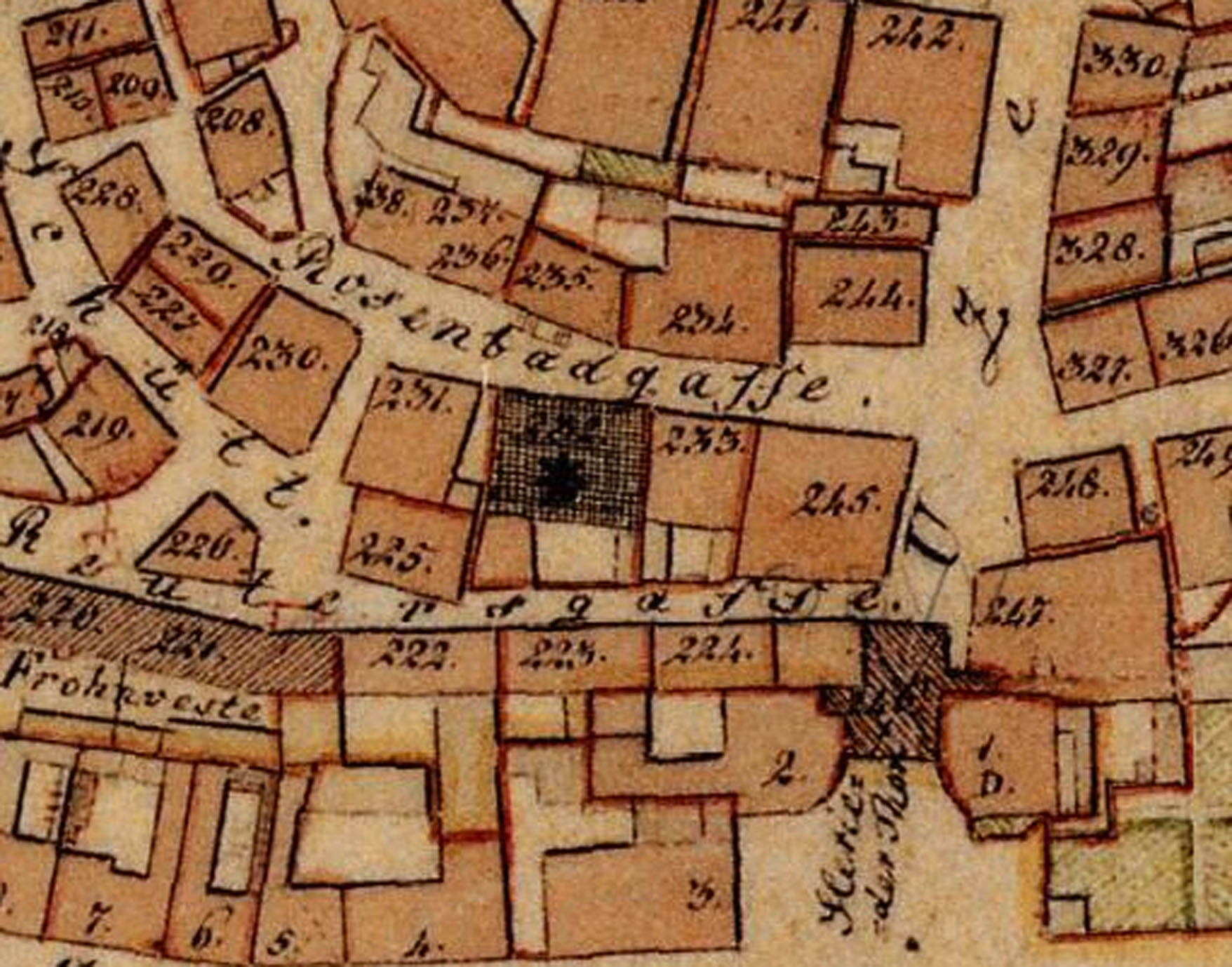 Synagoge, Historische Stadtkarte von Ansbach (1808), Ausschnitt